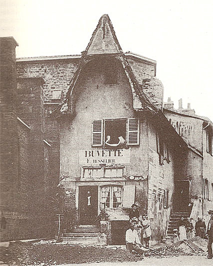 La maison bourbonnaise